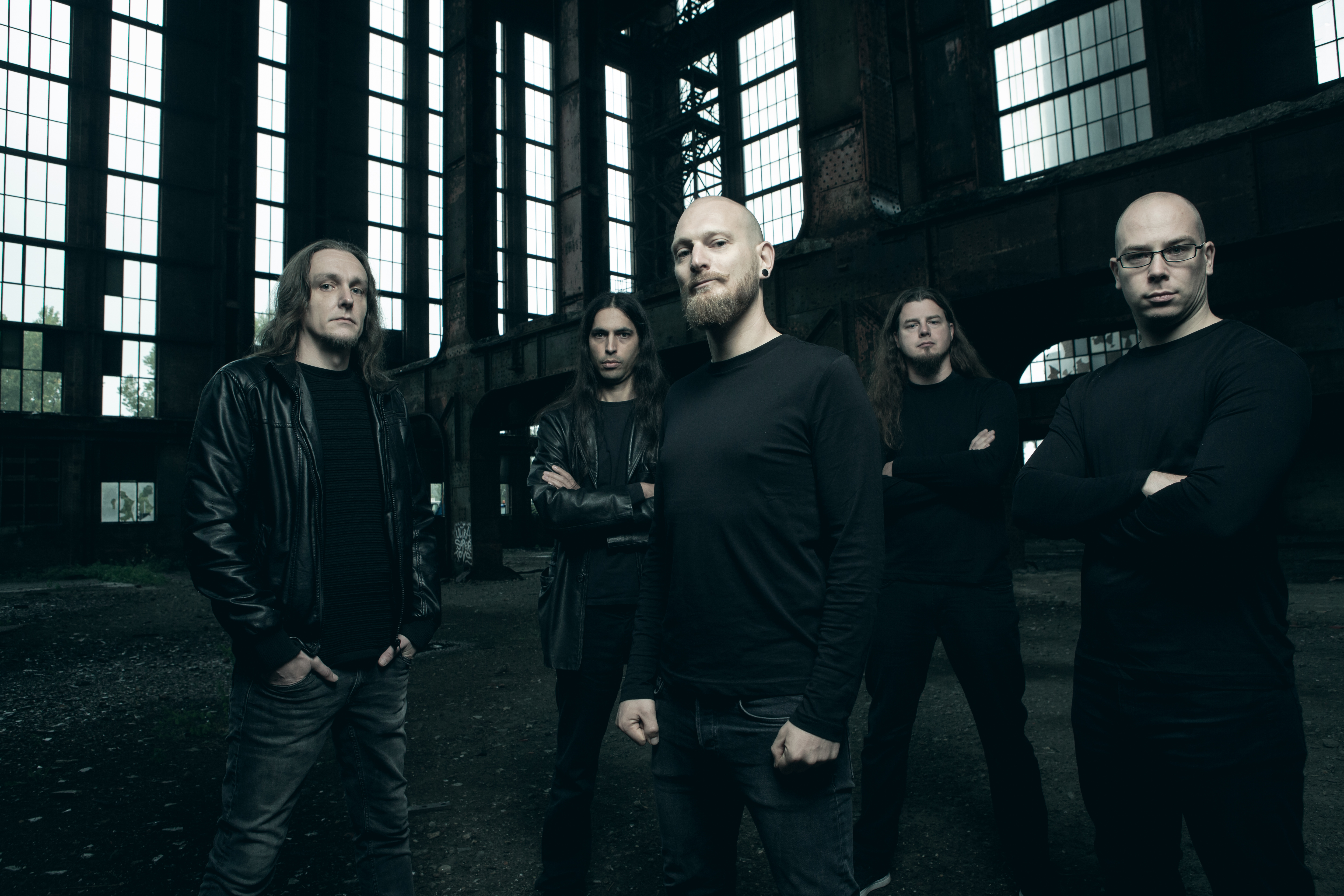 Groepsfoto, door Tim Tronckoe